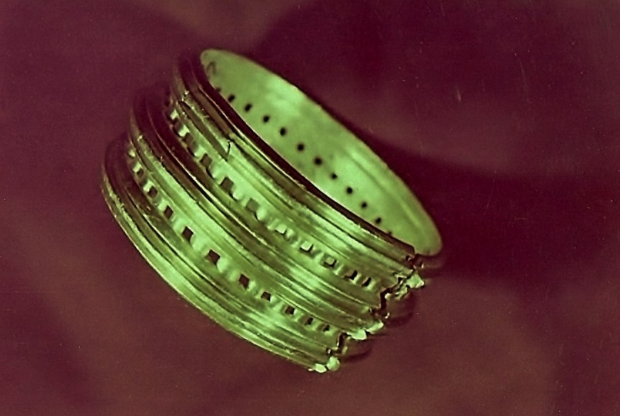 Brazalete número 23 del Tesoro de Villena.